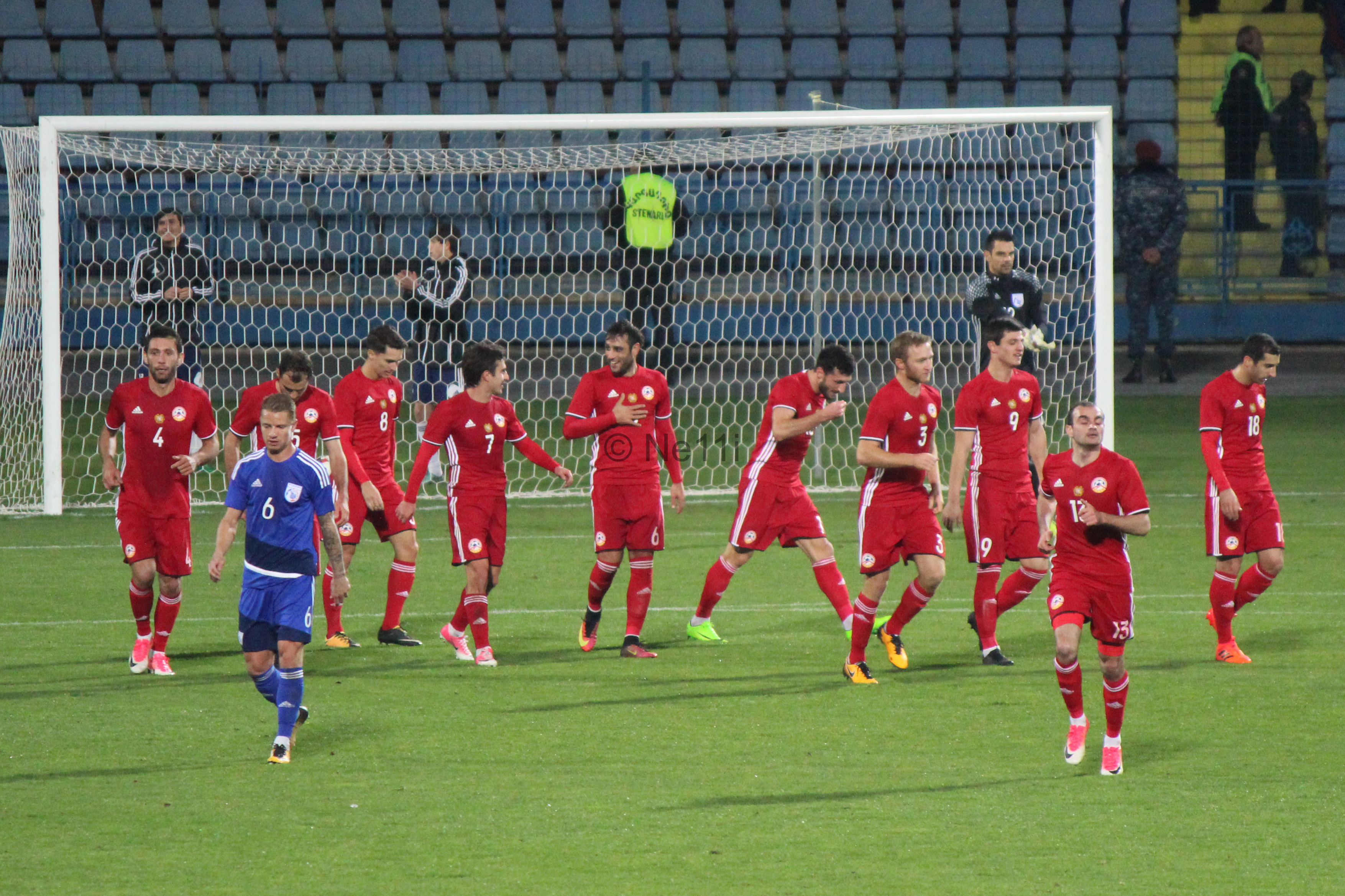 Hayk Ishkhanyan (The first goal in Armenian National Team) against Cyprus: 1-0 (3-2)